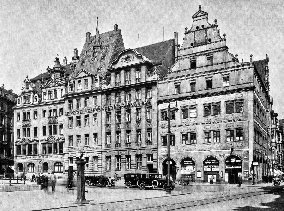 Ansicht der Nordeseite des Leipziger Marktes, um 1925.